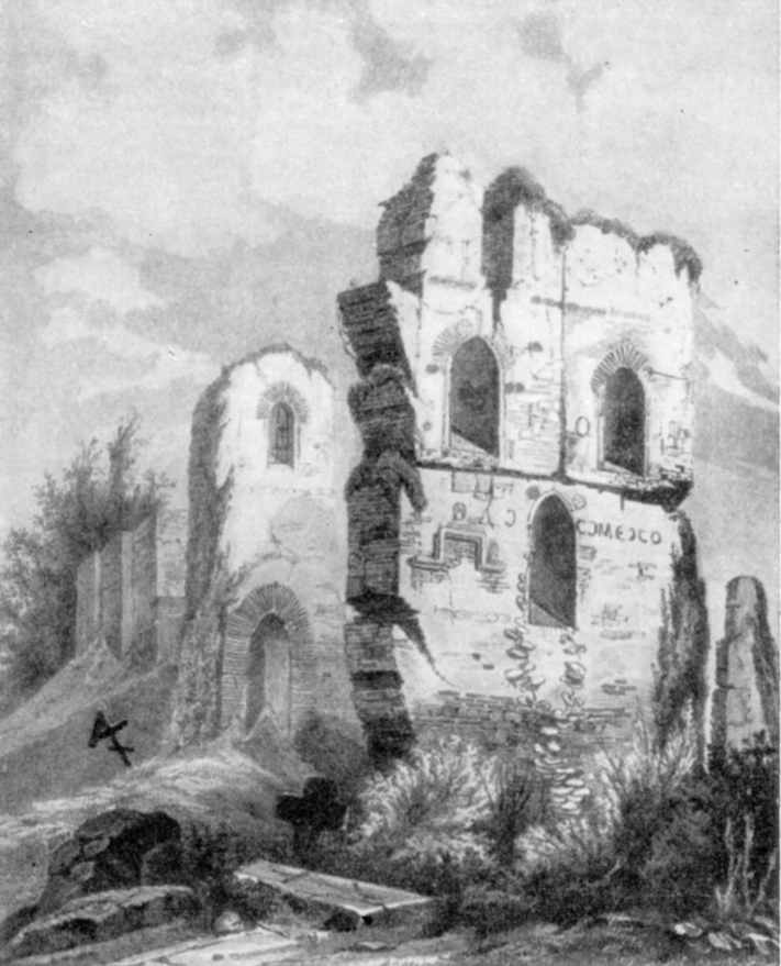 Зарисовка руин Десятинной церкви.